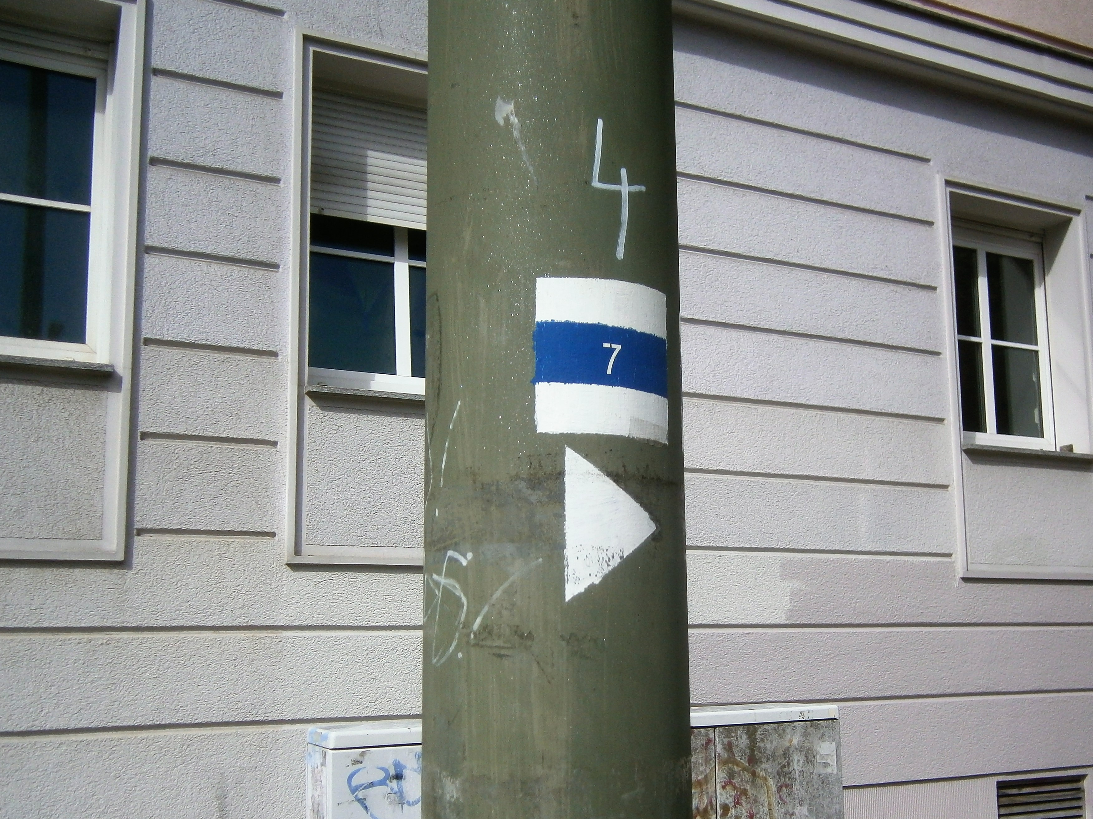 Die Kniprodestraße ist ein Verkehrszug im Berliner Bezirk Pankow, Ortsteil Prenzlauer Berg mit Grundstückszählung in Hufeisen. Bild: Markierung Grüner Hauptweg 7 = Hönower Weg vor den Häusern 119/120.